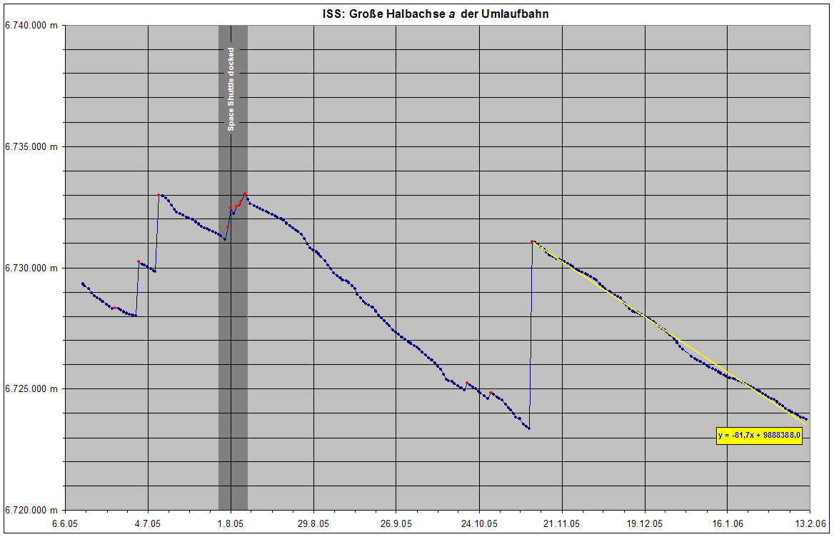 Internationale Raumstation: Verlauf der großen Halbachse